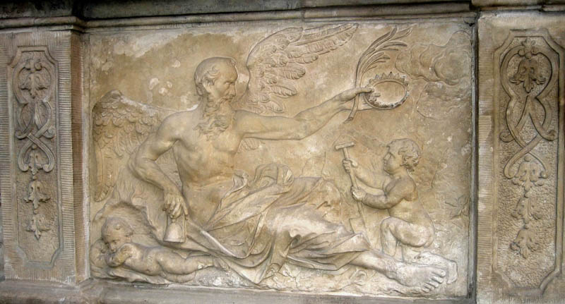 Johann Heinrich Meissner, Chronos